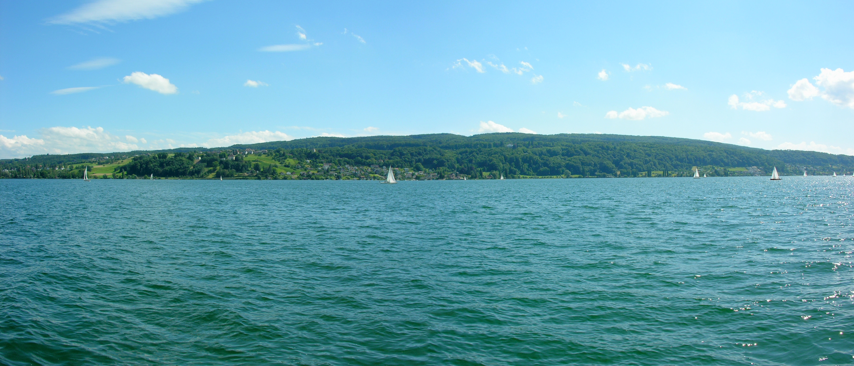 Switzerland, Thurgau, Mannenbach-Salenstein on Untersee